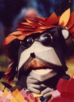 Momfer de Mol uit de Fabeltjeskrant